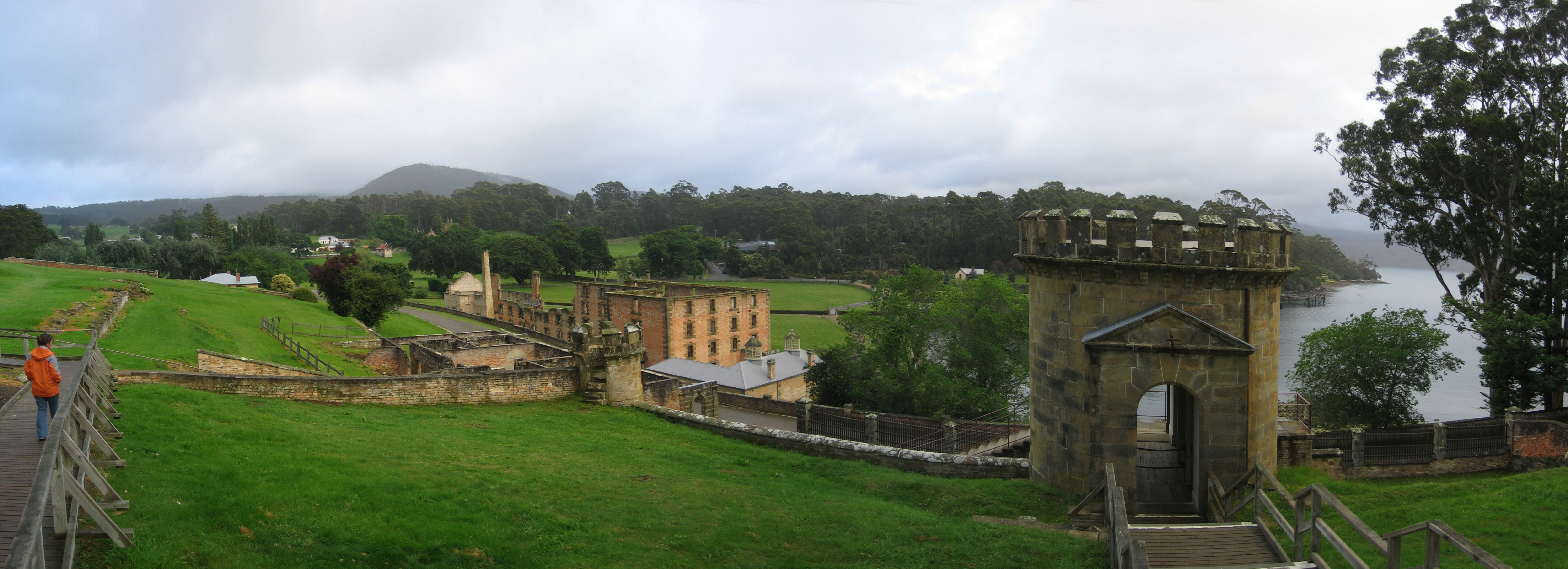 Panoramique de Port Arthur, Tasmanie, Autralie.